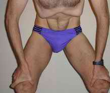 Je suis l'auteur de cette photo